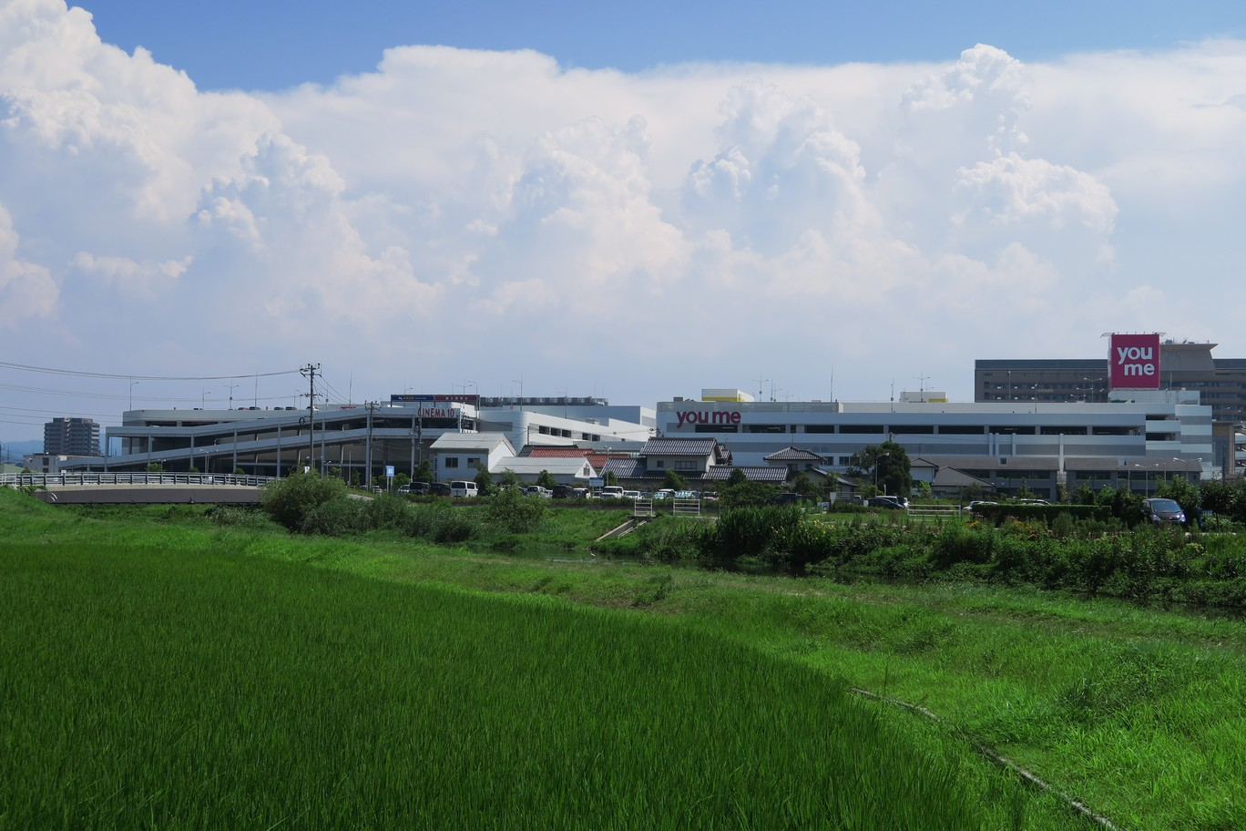 ゆめタウン出雲（北側から撮影）